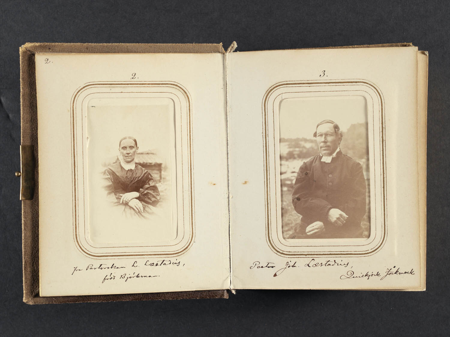 Depicted person: Johan Laestadius, Kyrkoherde, Sverige (SE) (1815-1895) depicted place: Lappland, Jokkmokk, Jokkmokk (Sverige (SE))